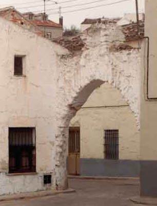 Arco de la Villa en Santa Cruz de la Zarza (Toledo, España)//Arco de la Villa in Santa Cruz de la Zarza (Spain)